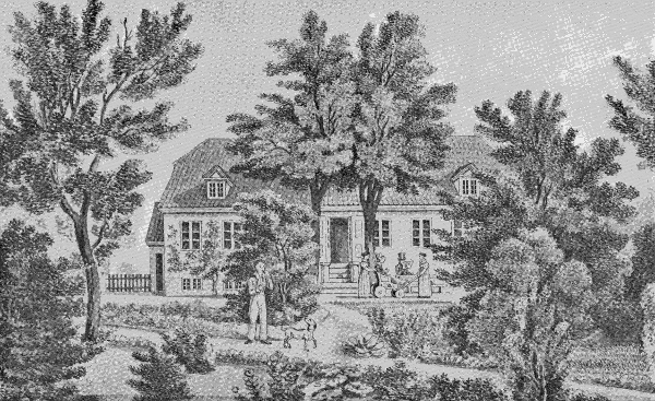 Nøjsomhed, vanished mansion in Østerbro, Copenhagen